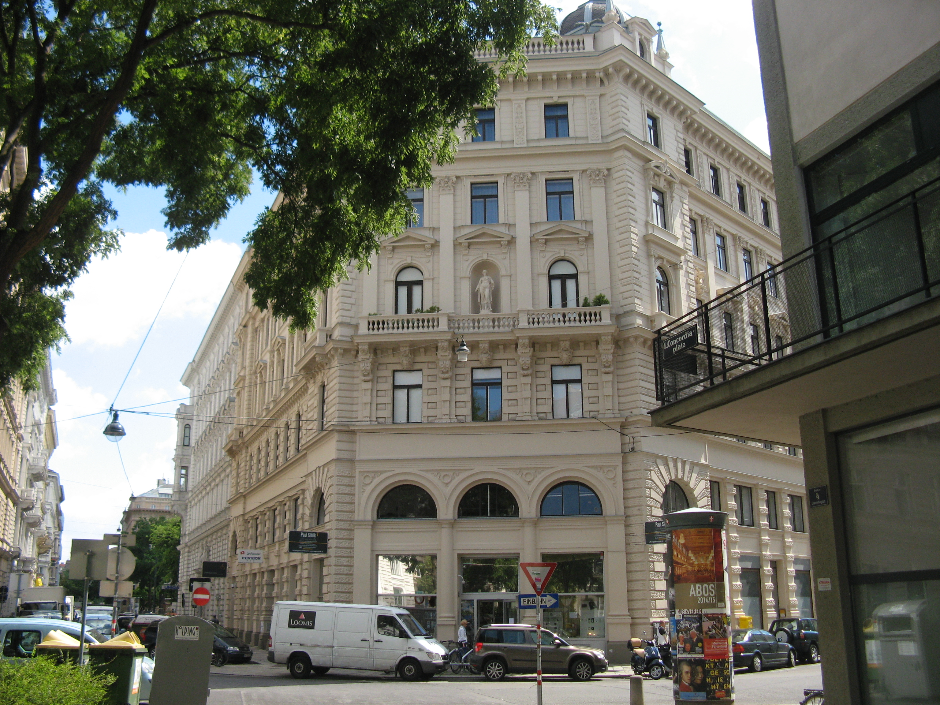 Haus (1881) von Heinrich Claus und Joseph Gross, Concordiaplatz 3, Wien-Innere Stadt